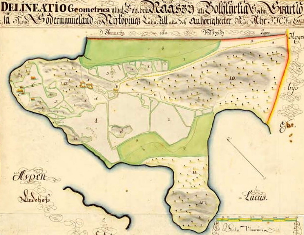 Karta över Näsbys ägor inför säteribildningen